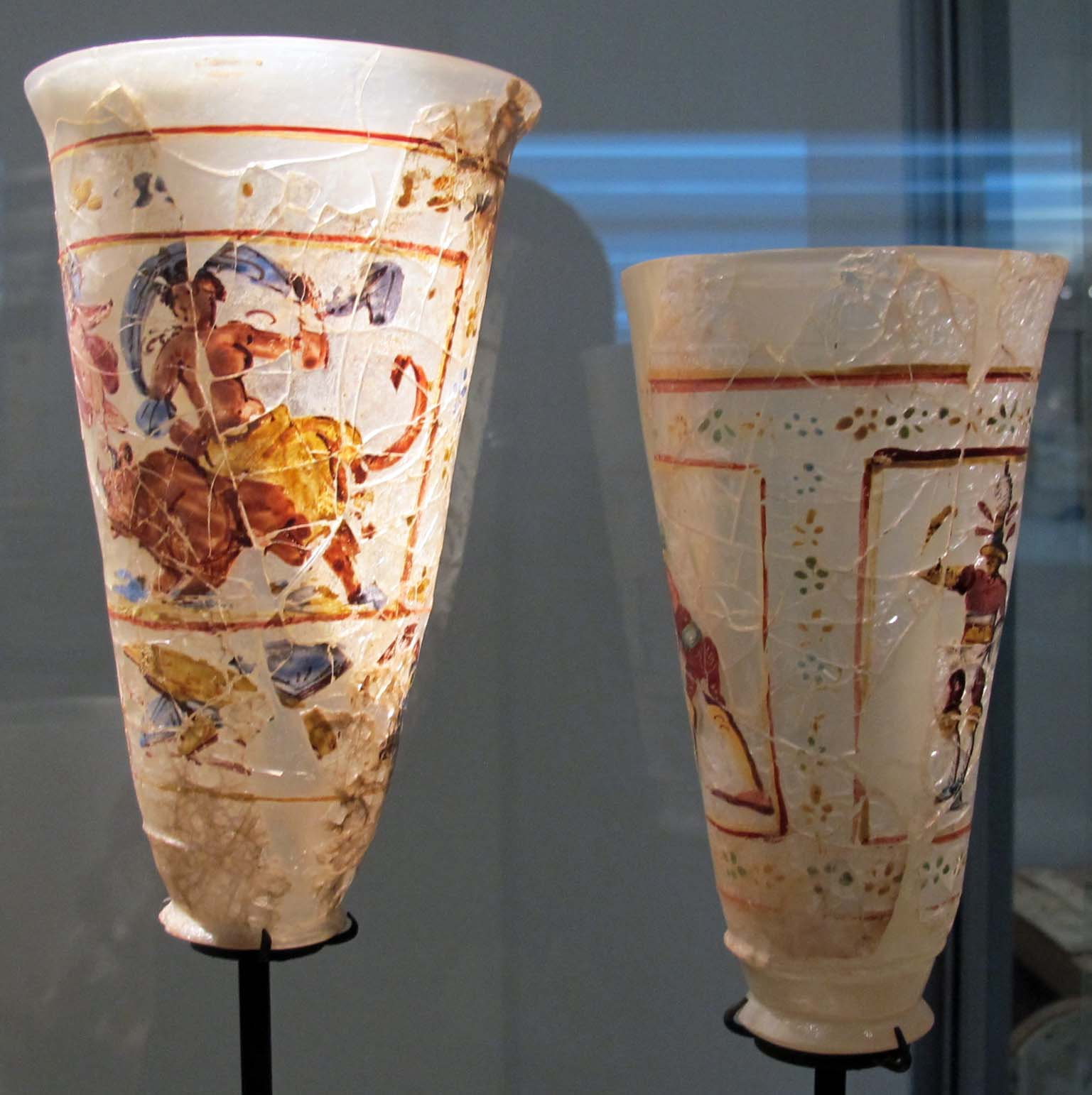 Afghanistan, bicchiere con decoro dipinto (ganimede), dal tesoro di begram, vetro, I sec